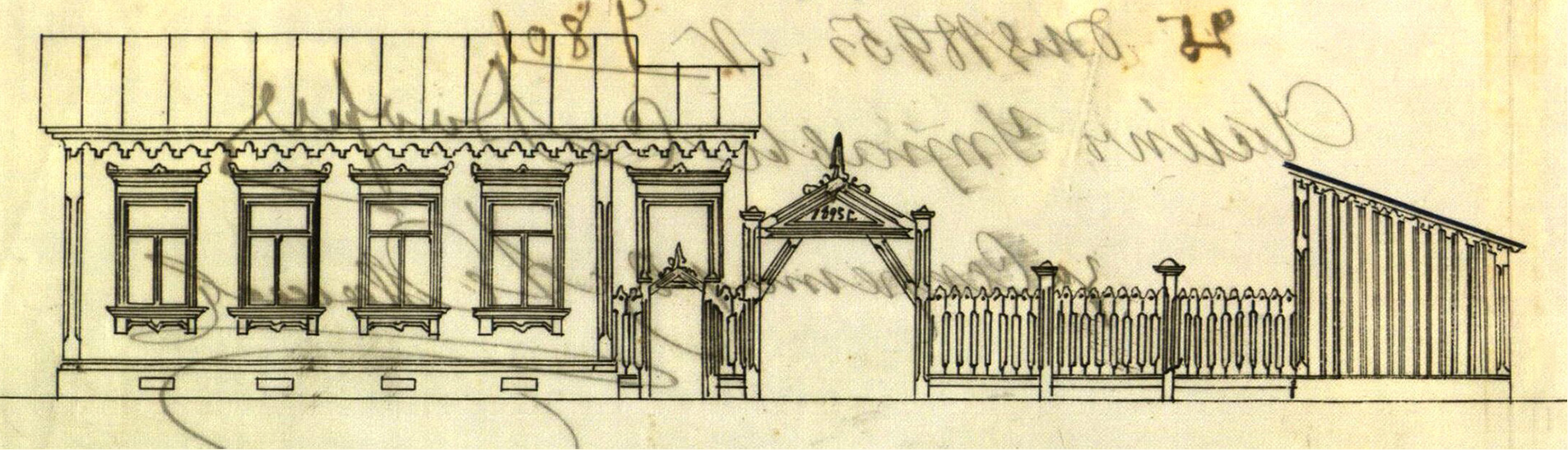 Беларуская (тарашкевіца): Менск (Miensk), Добрыя Мысьлі (Dobryja Myśli). Дом Бэнэдыкта Пілкі